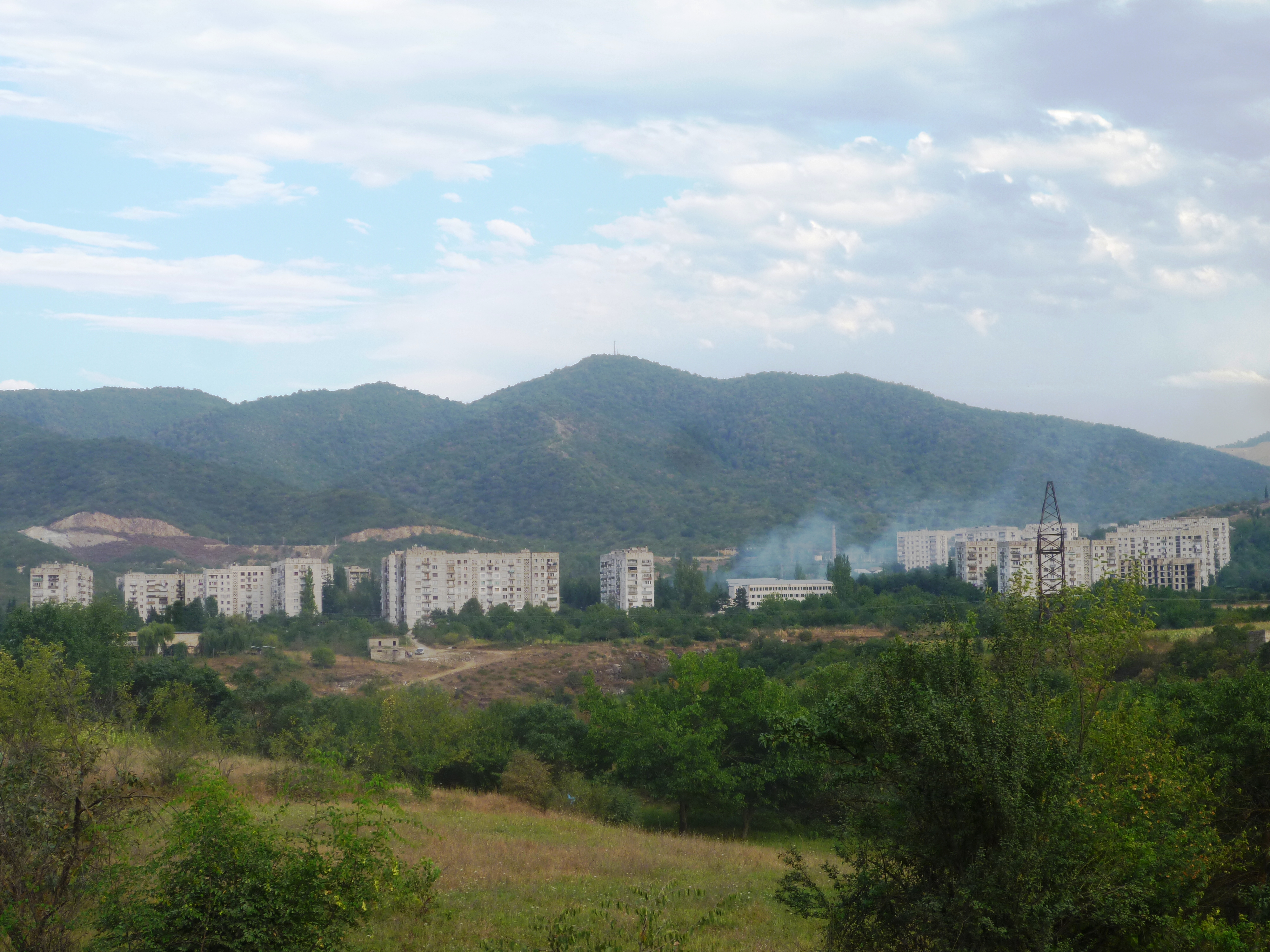 კაზრეთი, ხედი მთიდან